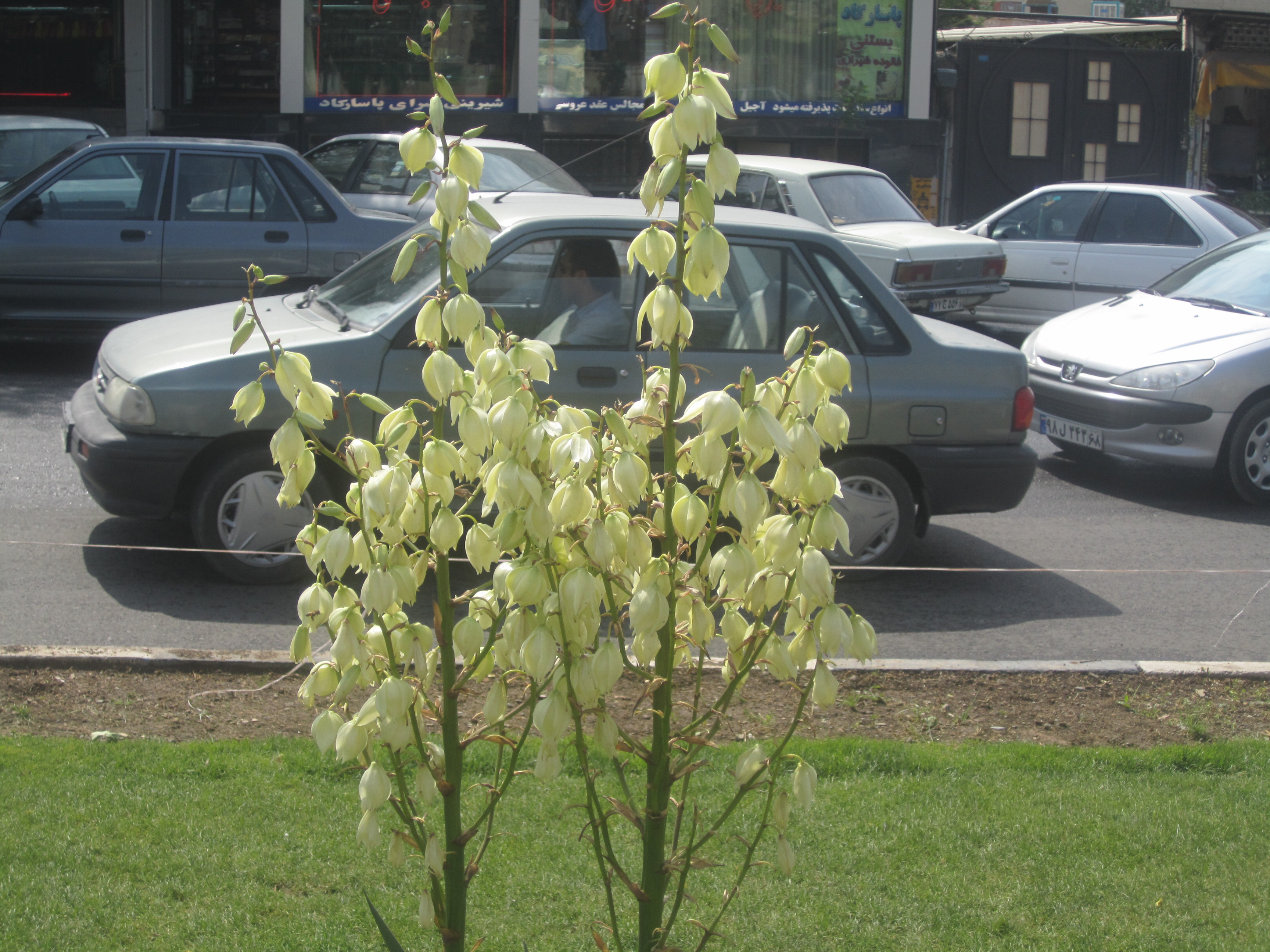 گل ها و شاخه های یوکای با شکوه (یوکا گلوریوسا) در میدانی در شهر کرج